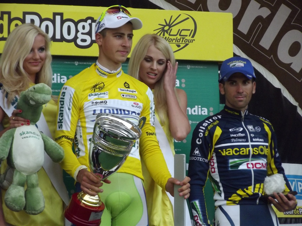 Zdjęcie zrobione podczas ostatniego etapu 68. Tour de Pologne w Krakowie.